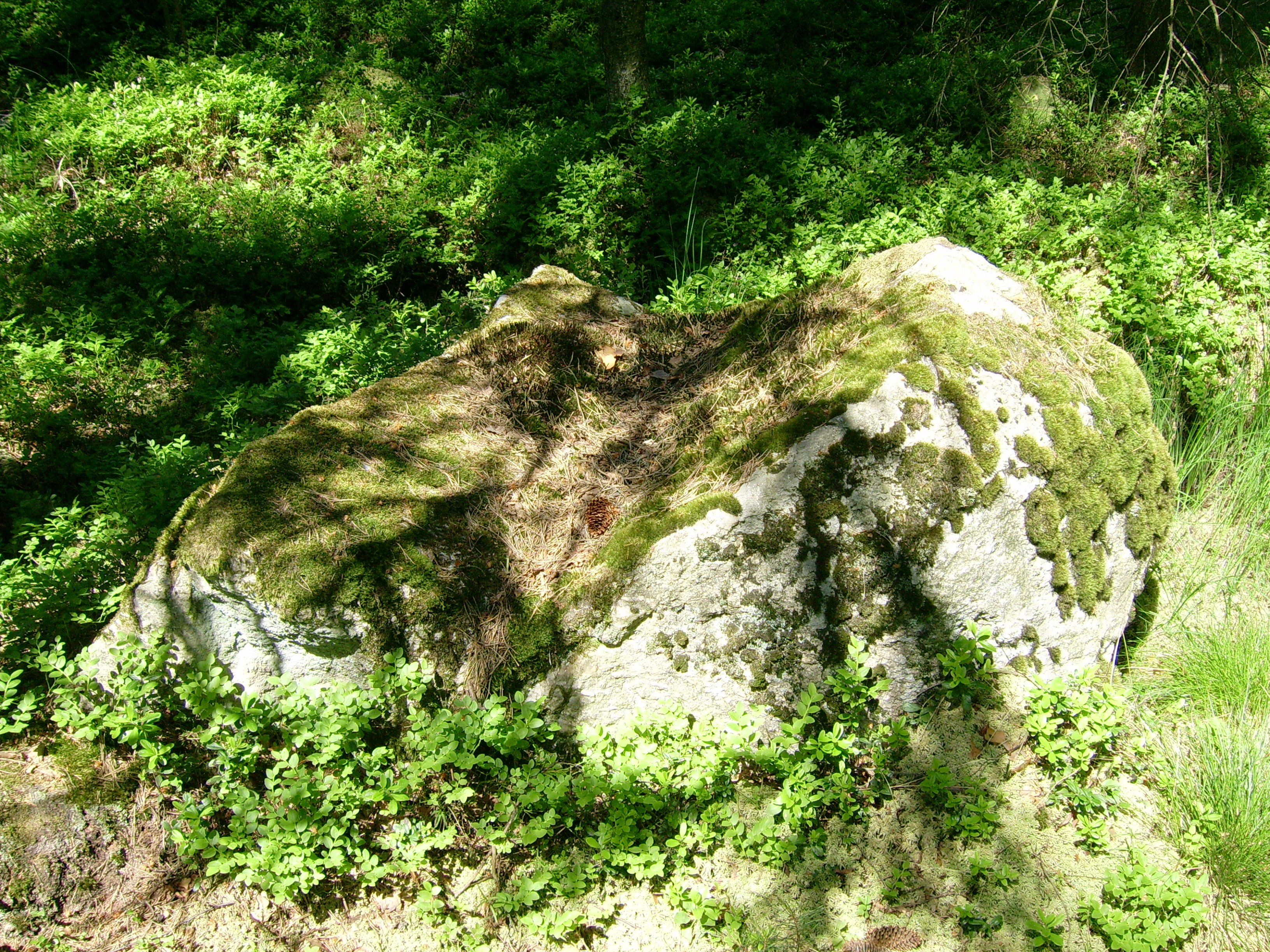 Velnio stalas – mitologinių akmenų grupė Mažonų seniūnijoje